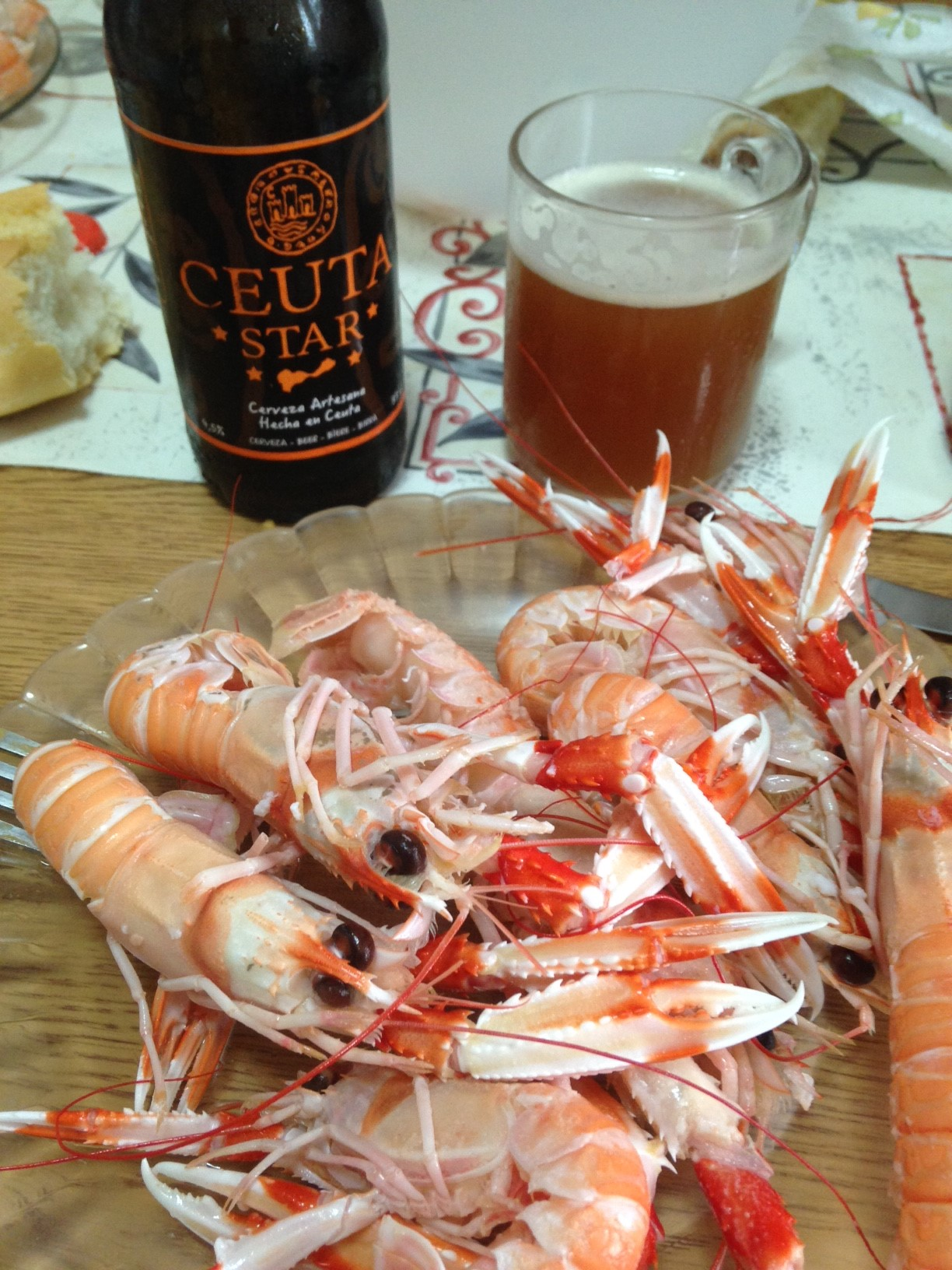 Cerveza Ceuta Star y Cigalas